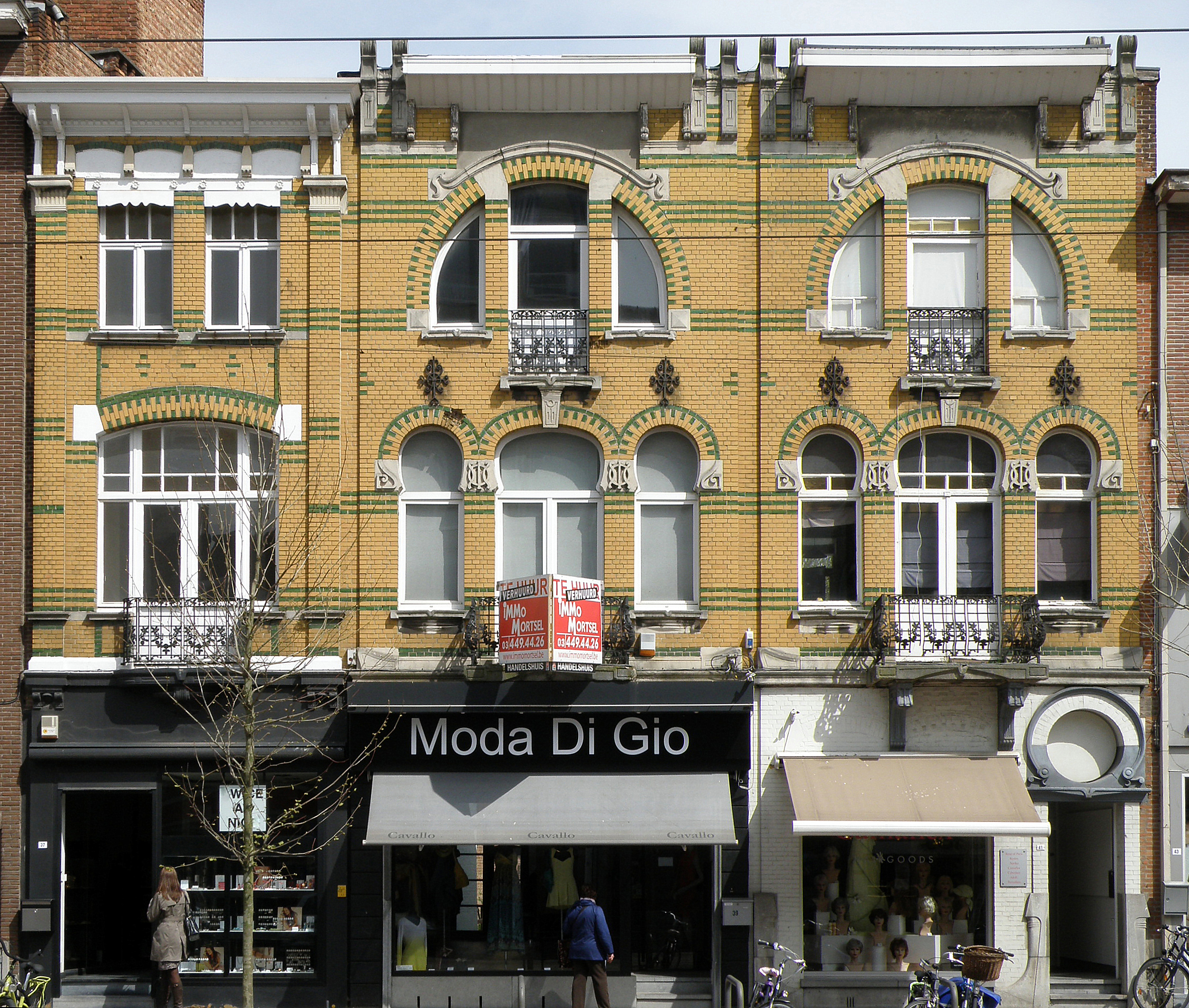 Mortsel bij Antwerpen. Art nouveau-huizen Statielei nr. 37, 39 en 41.